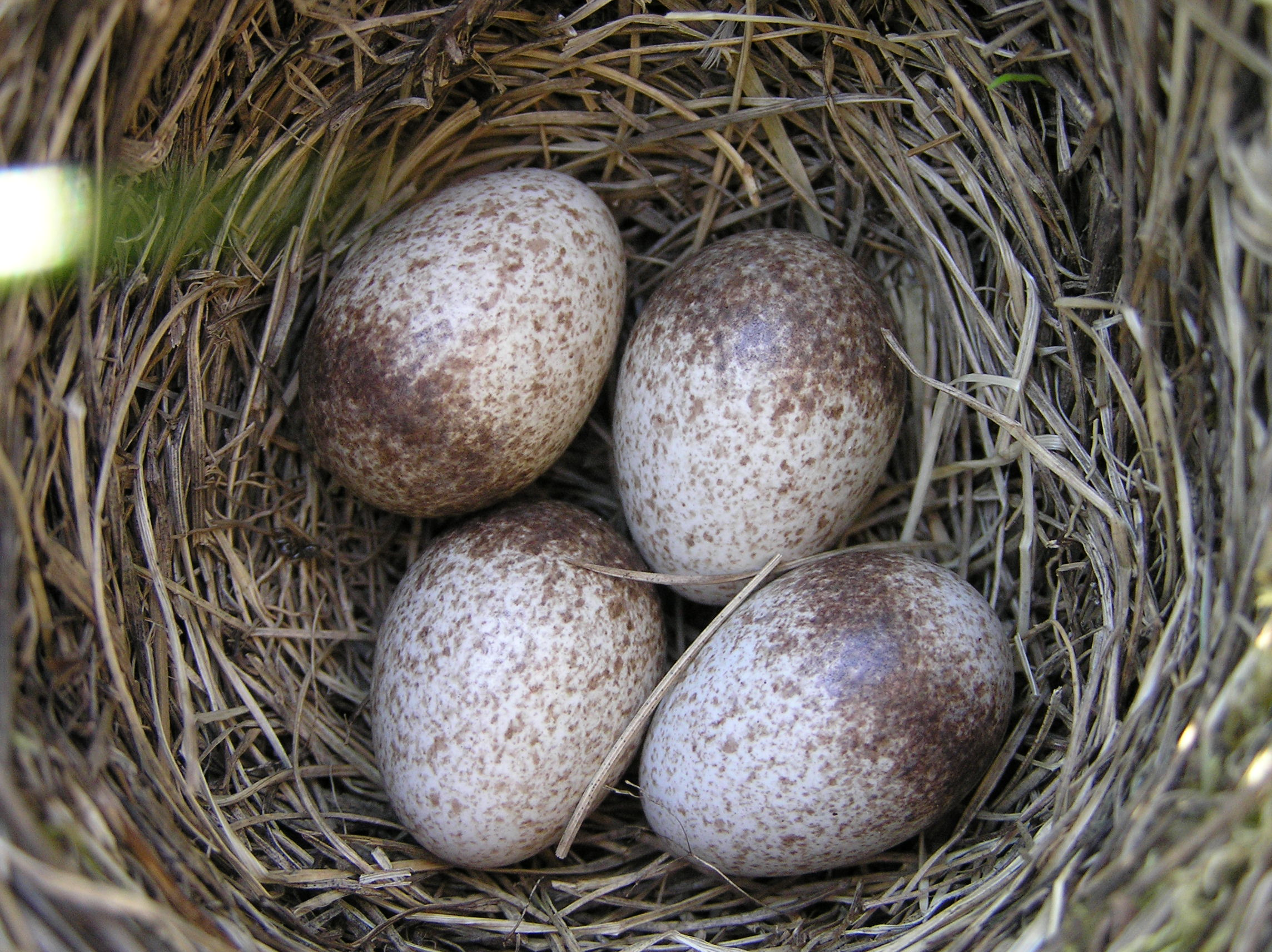 Skowronek, Alauda arvensis Białowieżaforest, Polska